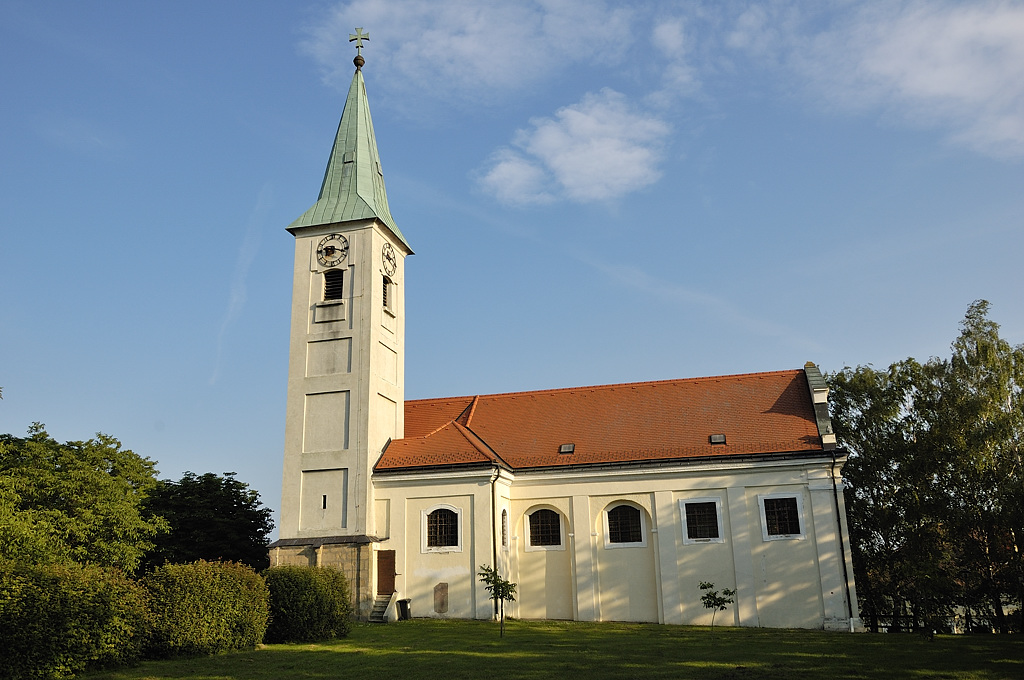 Kath. Pfarrkirche hl. Martin